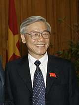 Nguyen Phu Trong